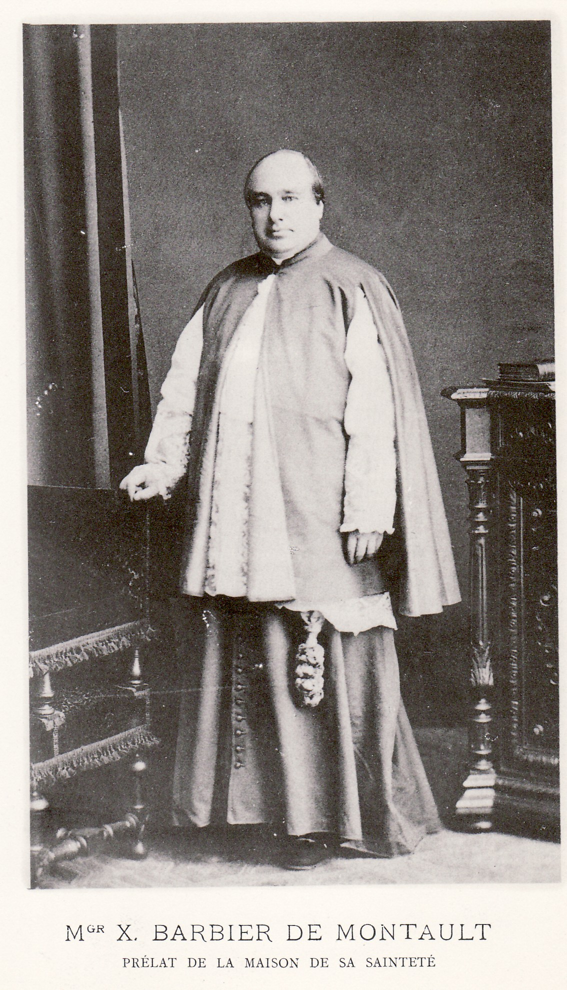 Xavier Barbier de Montault